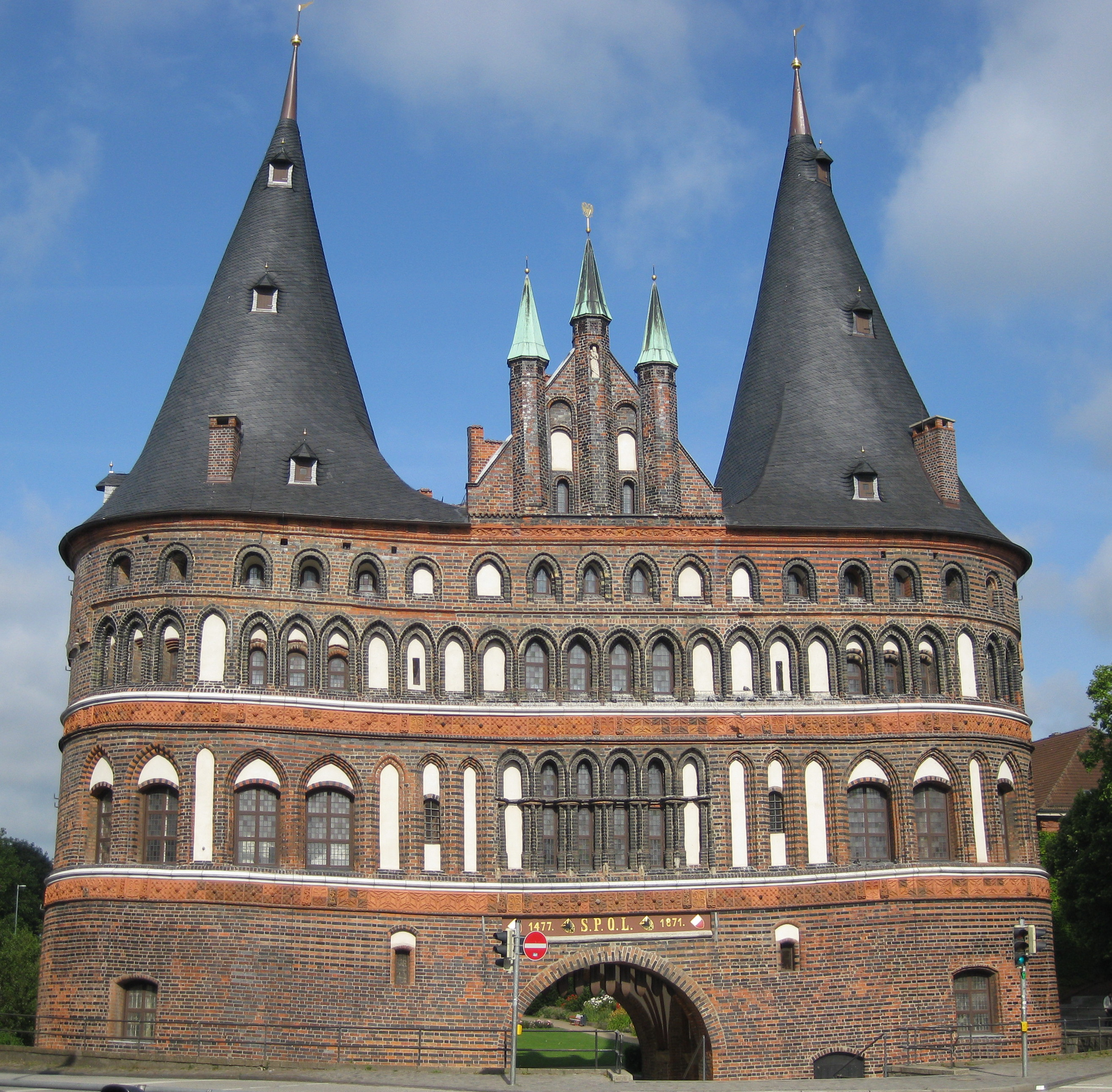 Holstentor in Lübeck, Stadtseite